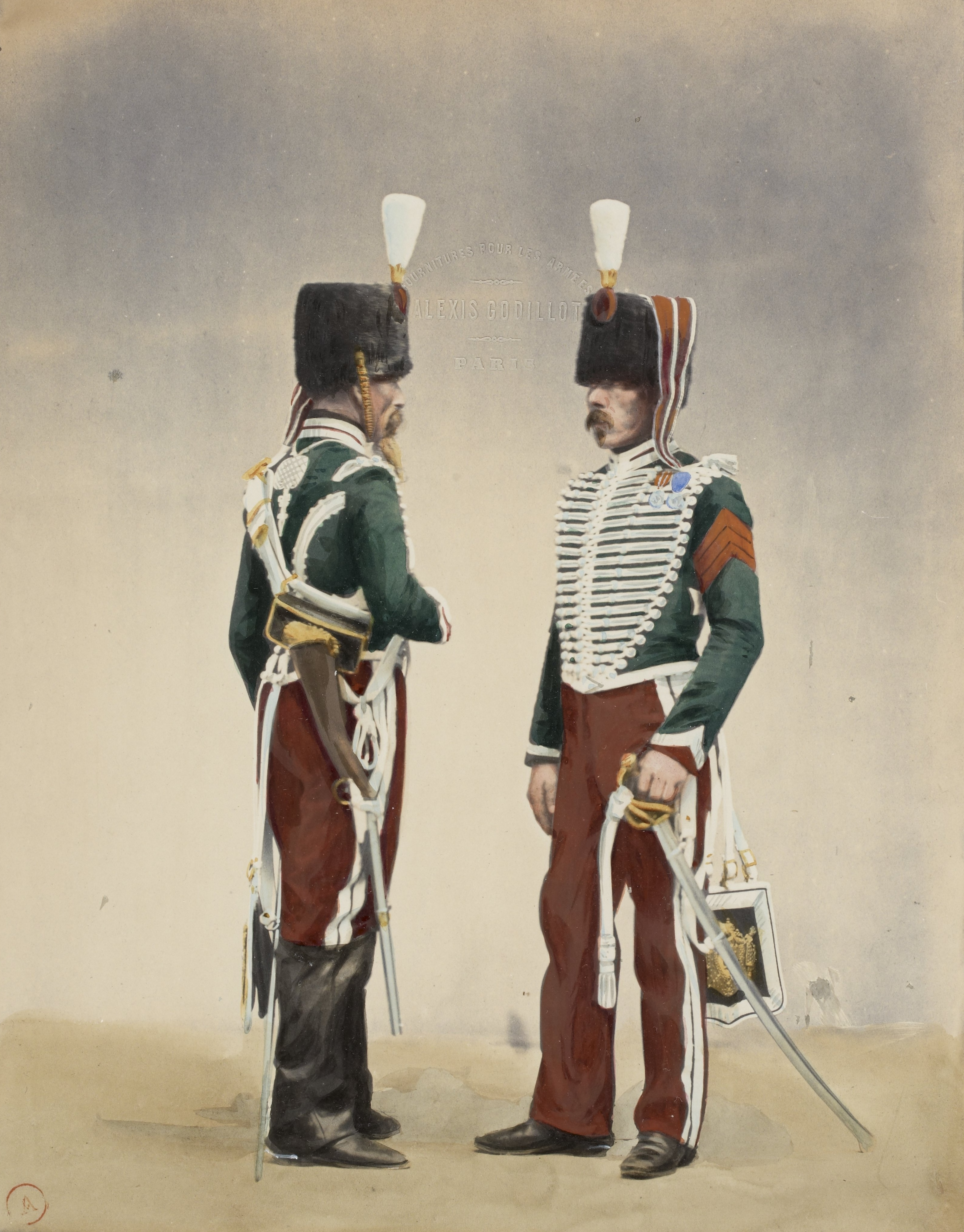 Album photographique des uniformes de l'armée française. Chasseurs à cheval de la Garde impériale, détail.